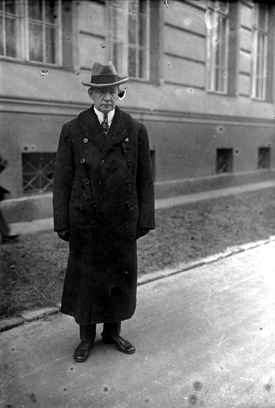 Der amerikanische Botschafter General Dawes wurde zum Führer der amerikanischen Abrüstungs-Deligation in Genf ernannt. General Dawes , welcher vom Präsident Hoover zum Führer der amerikanischen Deligation für die Abrüstungsconferenz in Genf Anfang nächsten Jahres ernannt wurde.